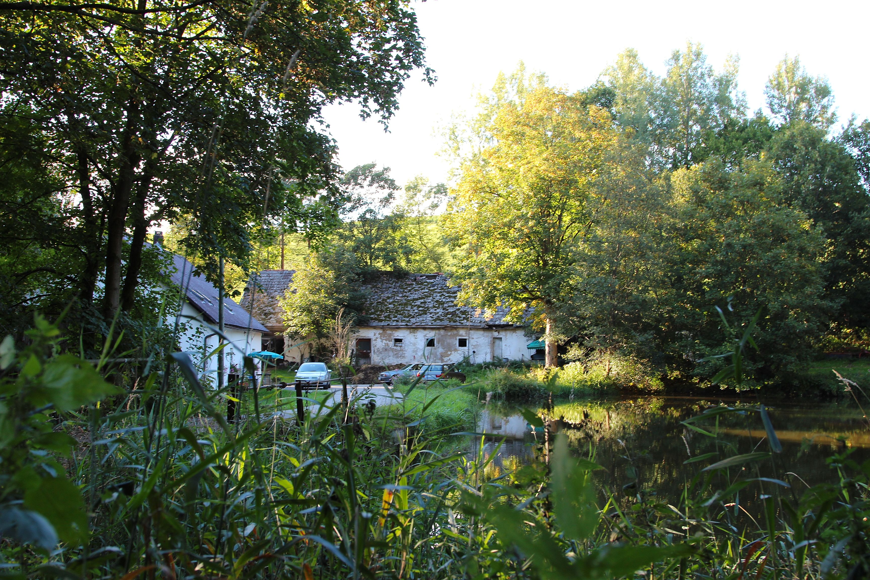 Gartenriedermühle bei Lukahammer; Stadt Oberviechtach, Landkreis Schwandorf, Oberpfalz, Bayern